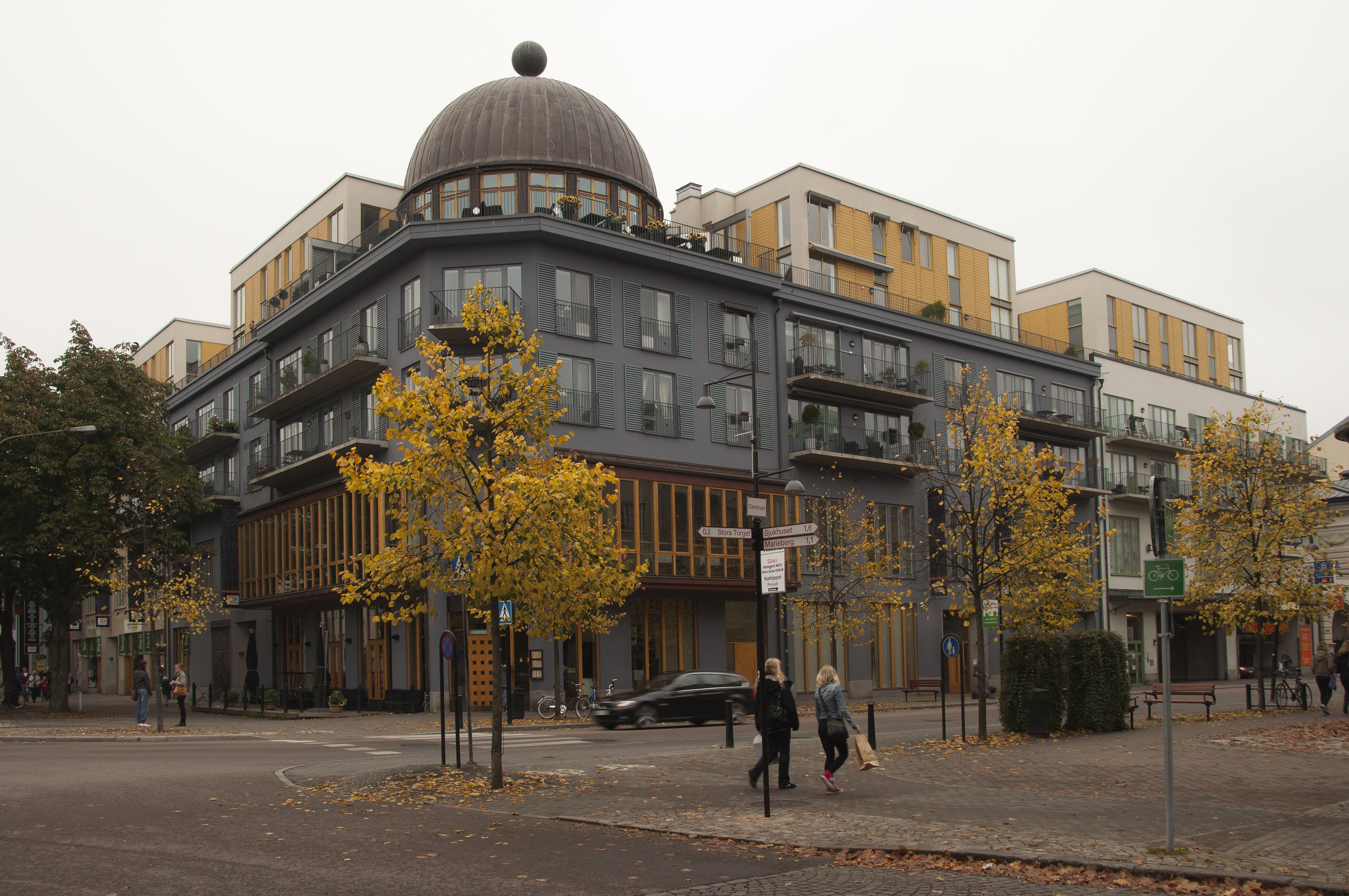 Mitt-i-city, Karlstad. Byggnadsår 2006. Arkitekter Brunnberg & Forshed